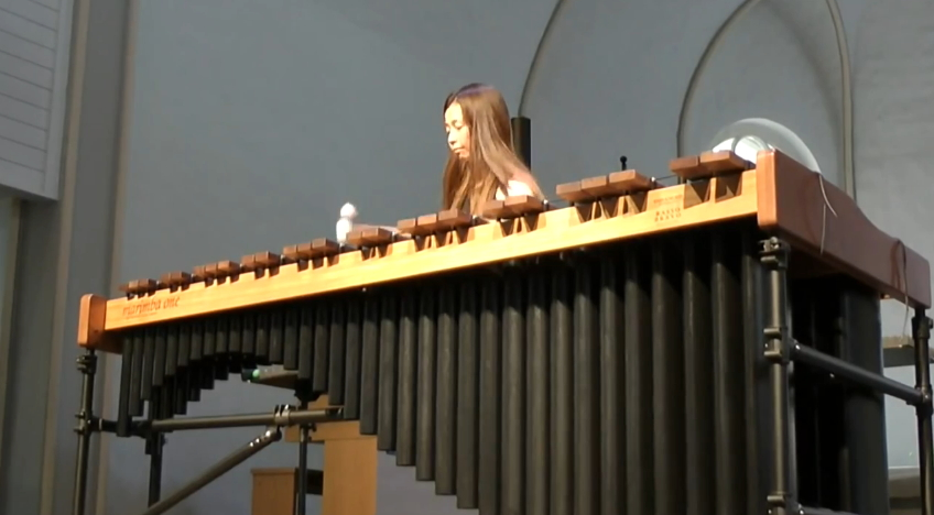 Кунико Като на концерте в Яани кирик (Санкт-Петербург). Фото сделано 17.07.2014.